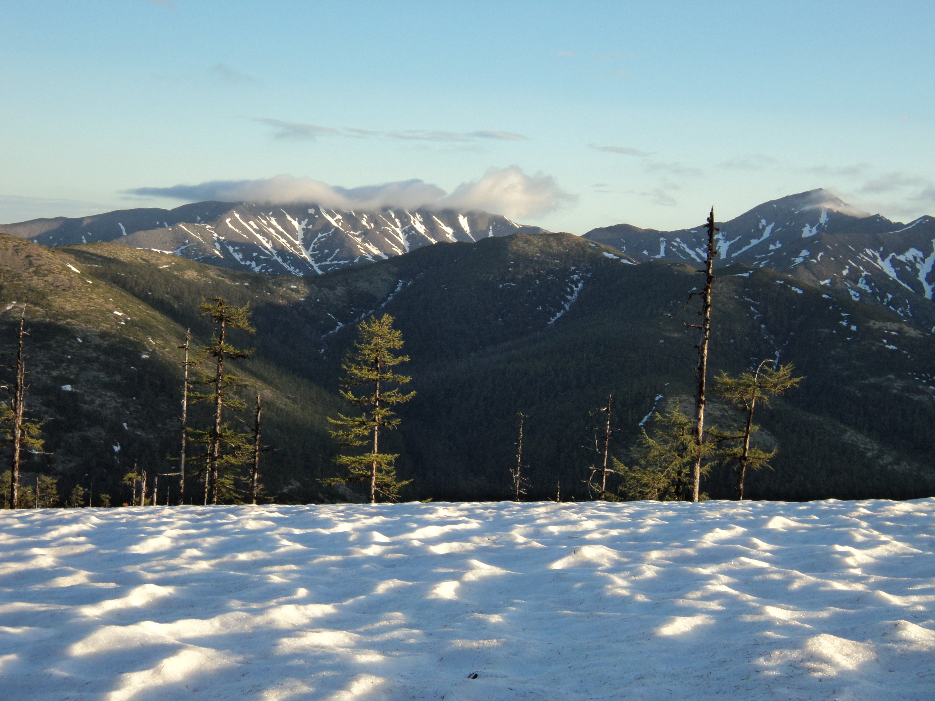 Южные отроги хр. Сунтар-Хаята в Хабаровском крае, в июне.